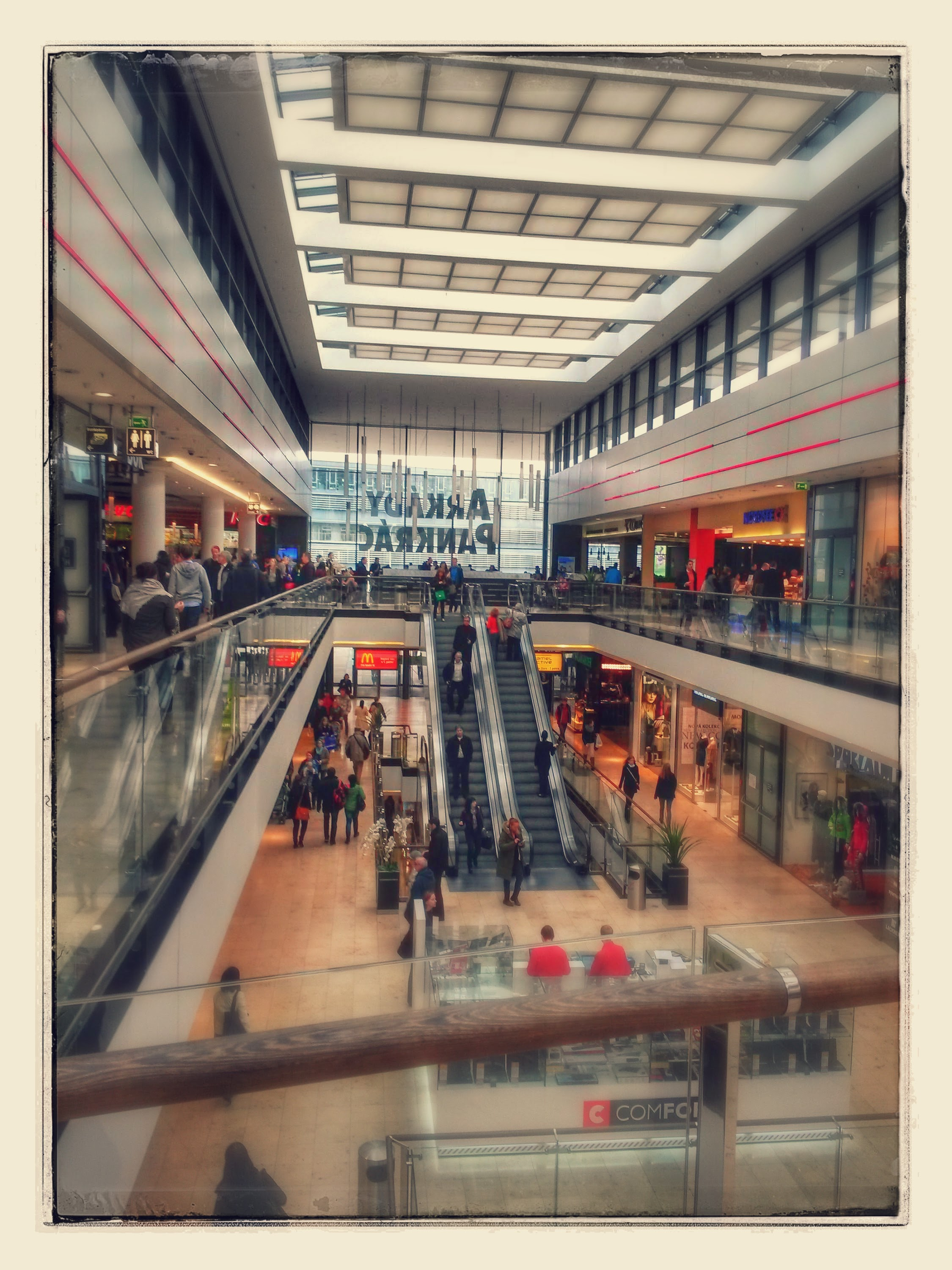 Arkády Pankrác, Praha, interiér